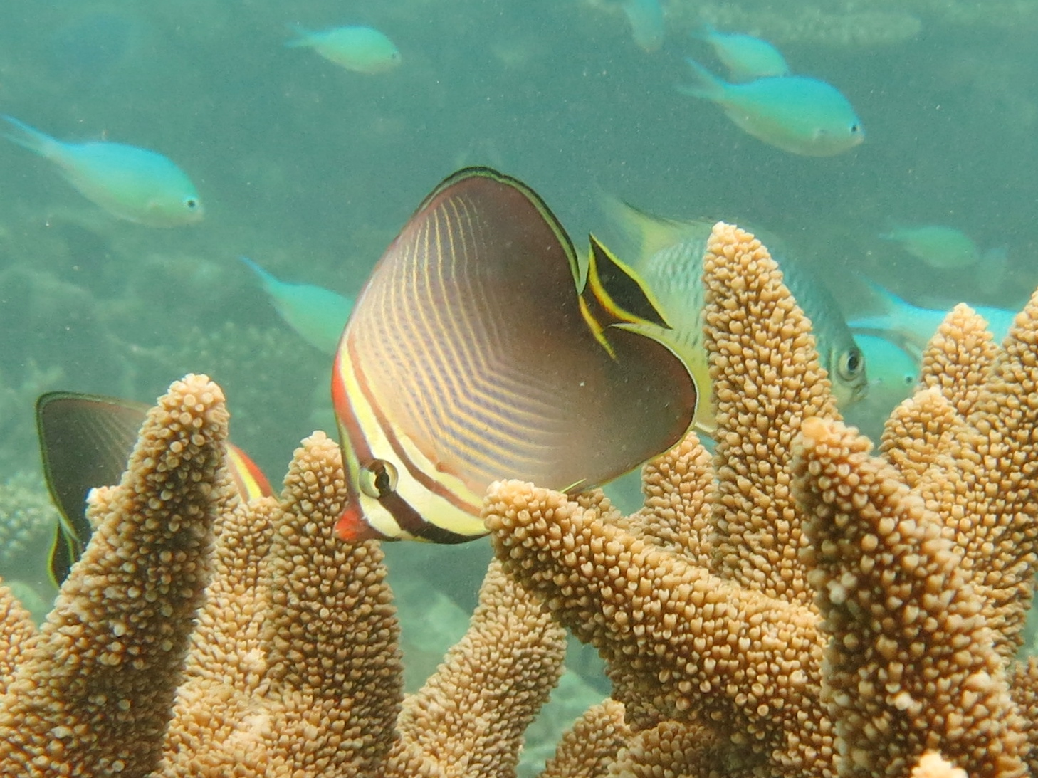 Un poisson-papillon triangle (Chaetodon triangulum) aux Maldives (Landaagiraavaru, atoll de Baa).